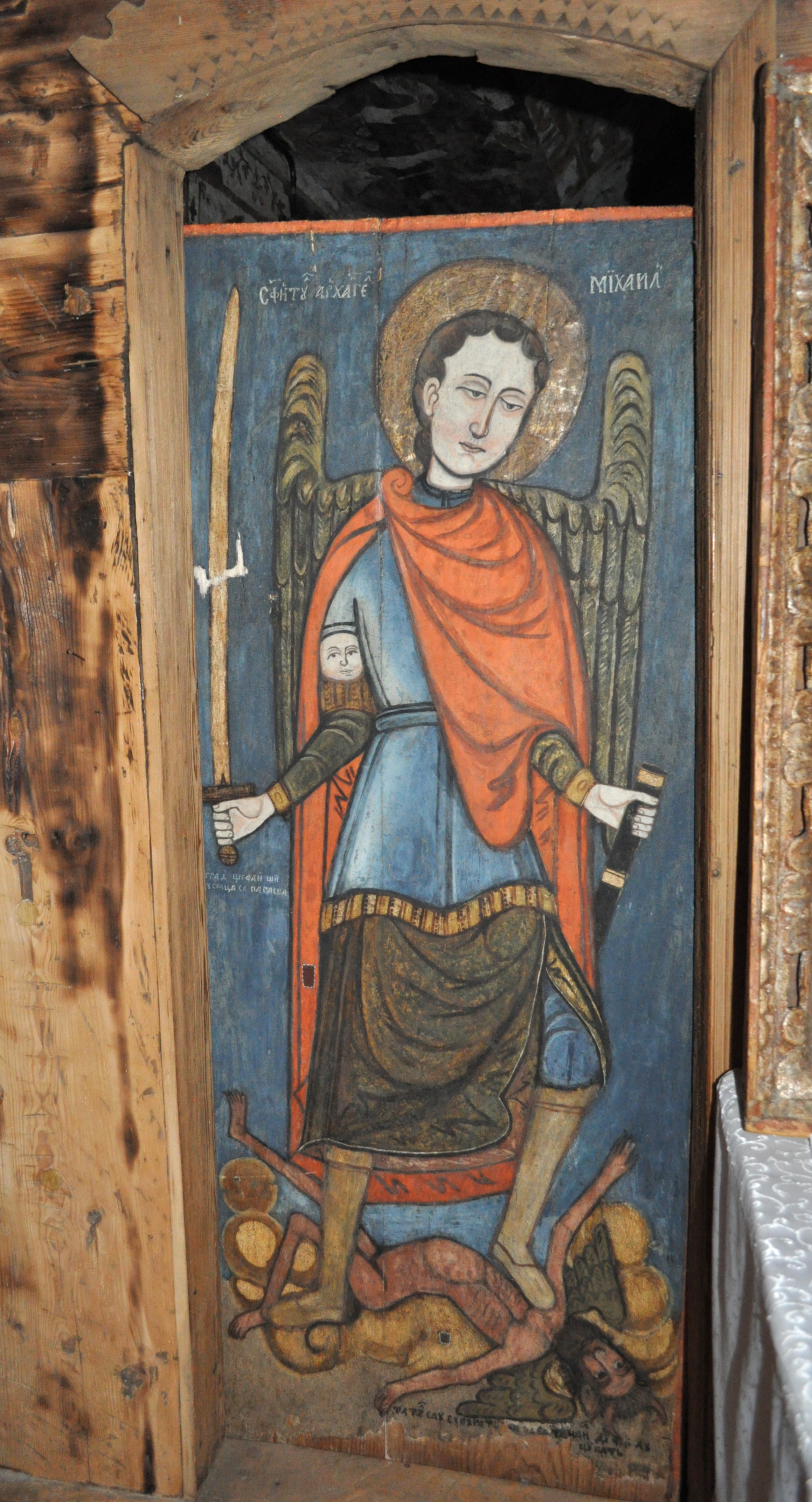 Biserica de lemn "Sf. Arhangheli", oraș Borșa, Str. Eternității 1